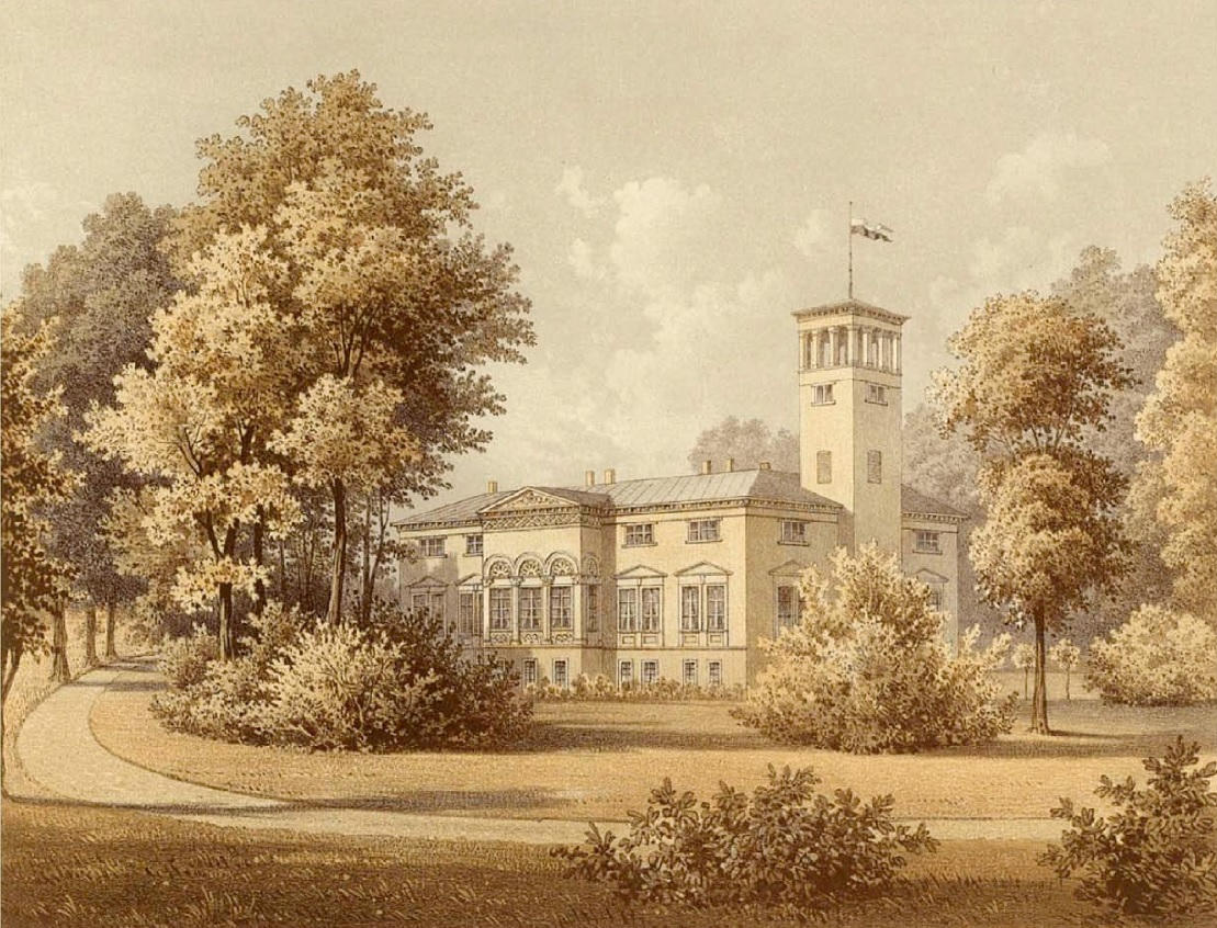 Rittergut Dahlwitz